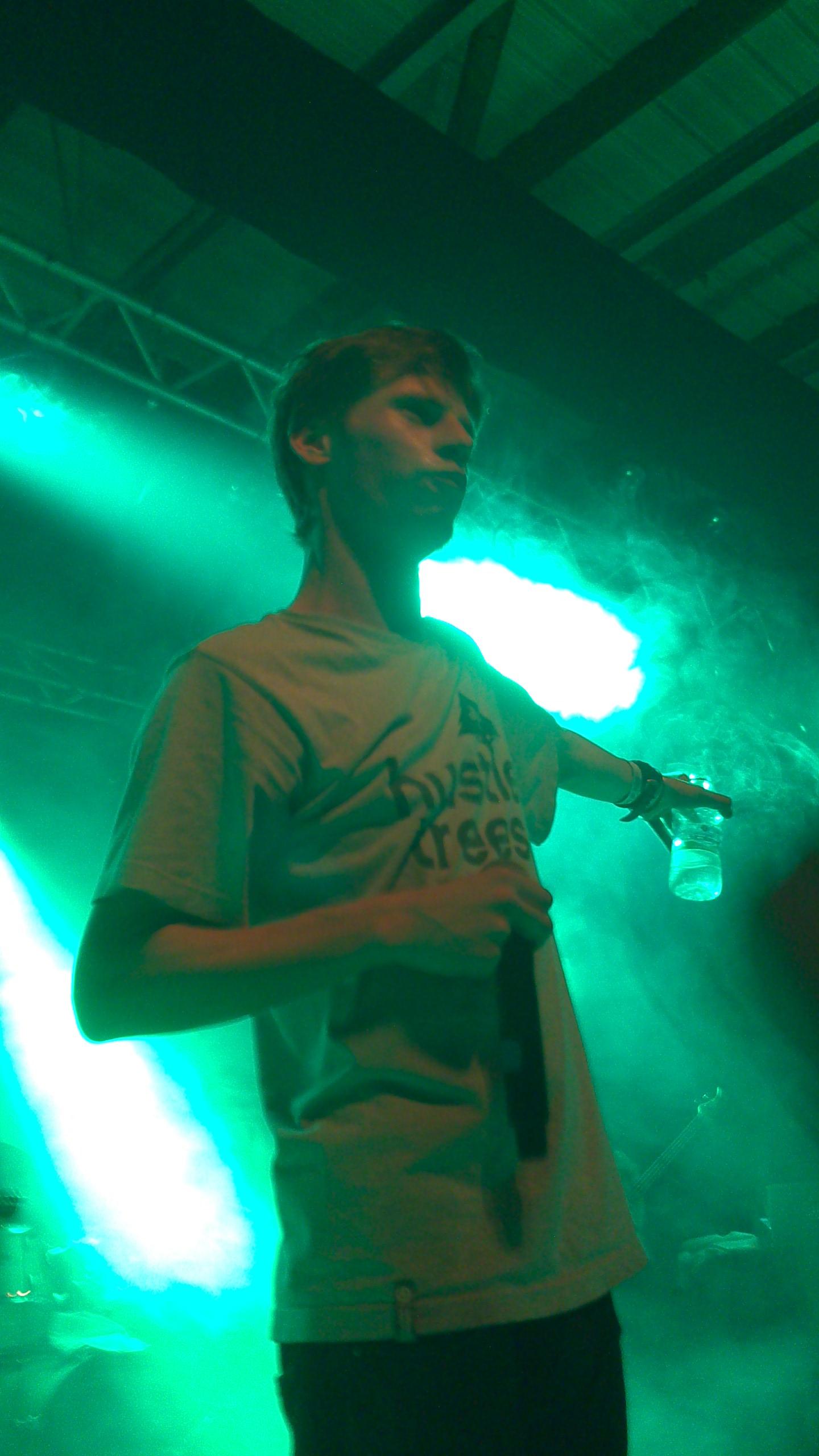 Naâman en live à Montmartin sur mer (50), festival "Réveillons-nous!" le 28 décembre 2013